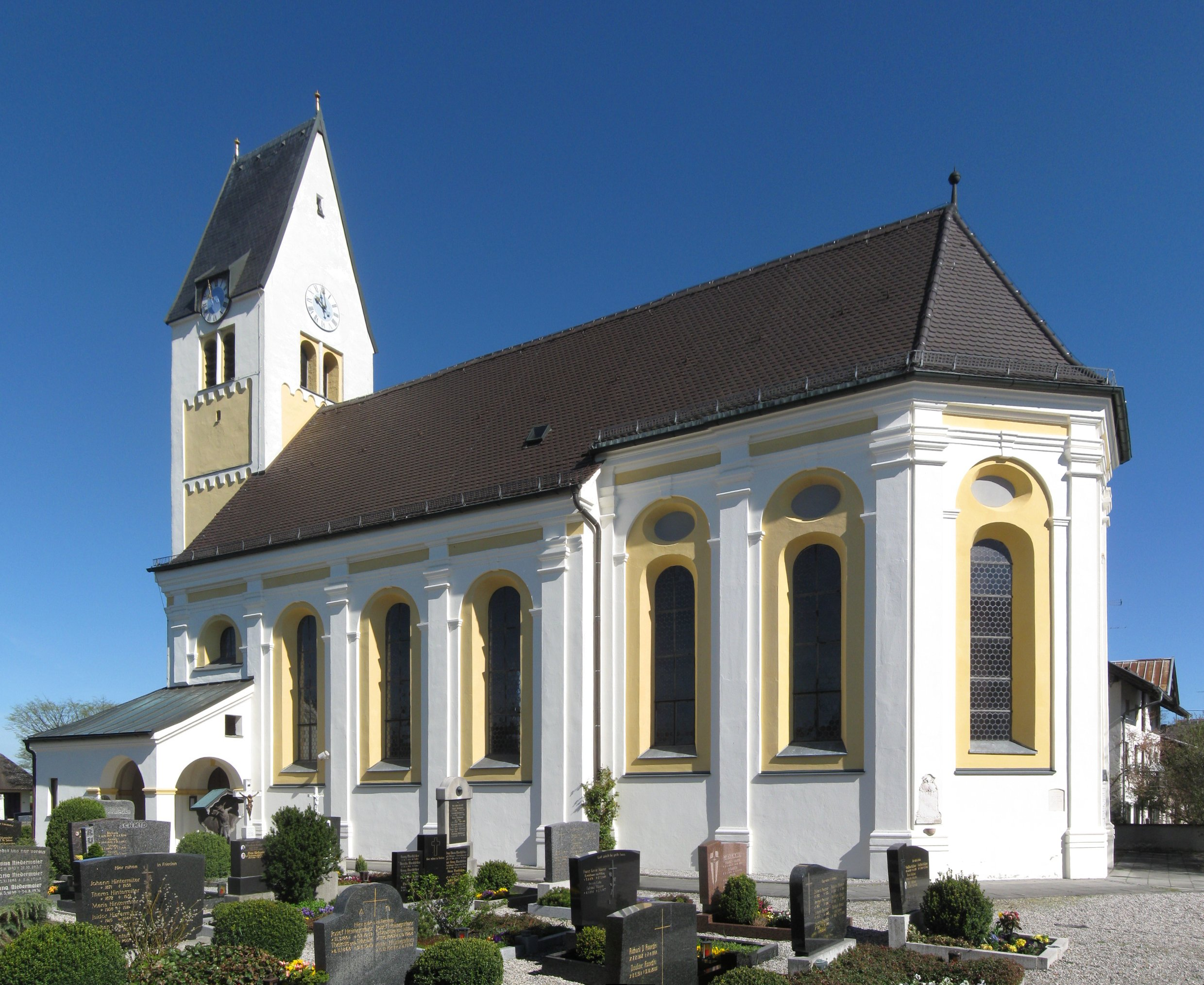 D-1-87-117-123 Berblinger Straße 10. Kath. Filiakirche St. Jakob, Saalbau mit Westturm, barocke Anlage, Turm im Kern spätmittelalterlich, Hans Mayr d.Ä., 1688-97; mit Ausstattung.